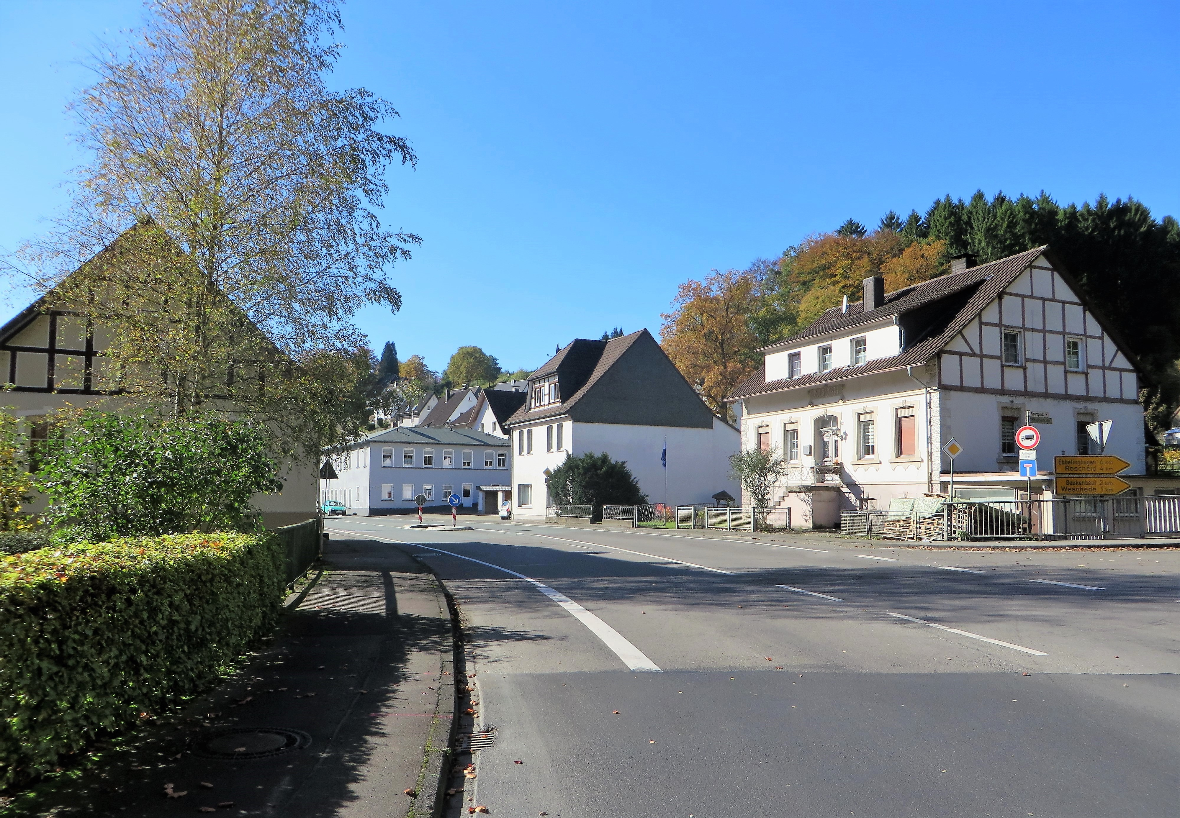 Blick von der Ihnestraße (L 539) auf Papiermühle (Attendorn) am Abzweig Wesetalstraße.